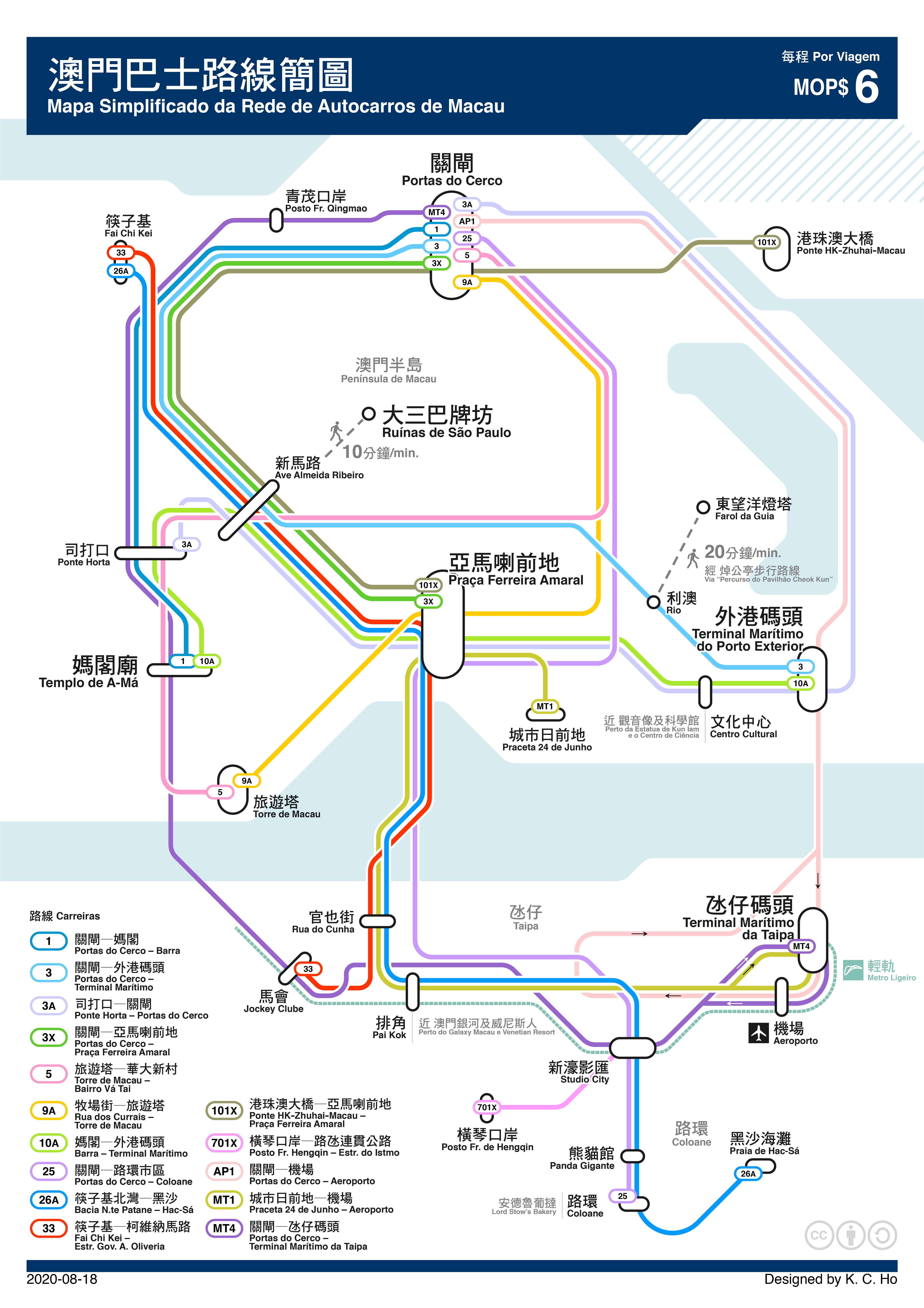 路線圖 - 澳門巴士路線簡圖